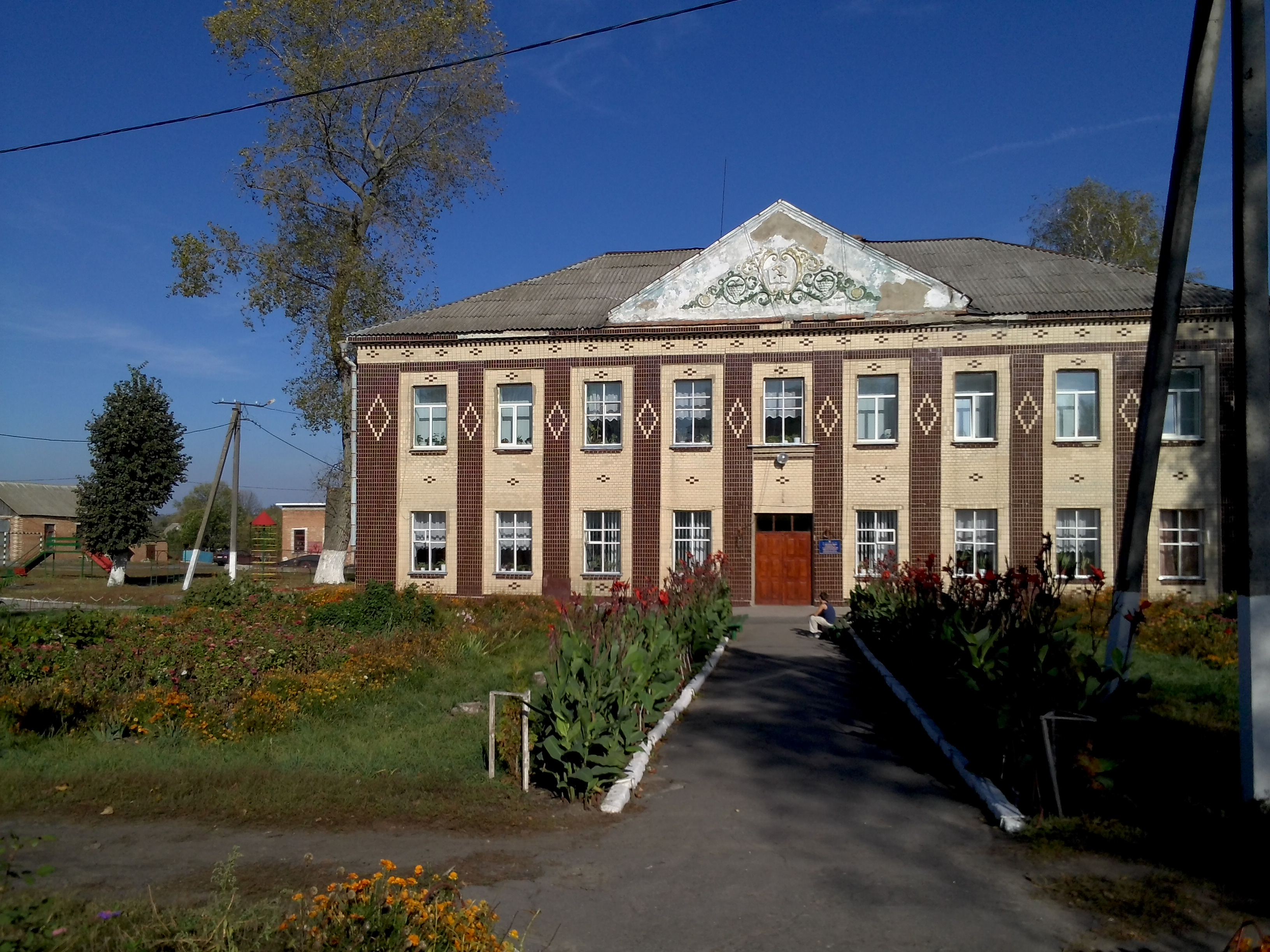 с. Самгородок